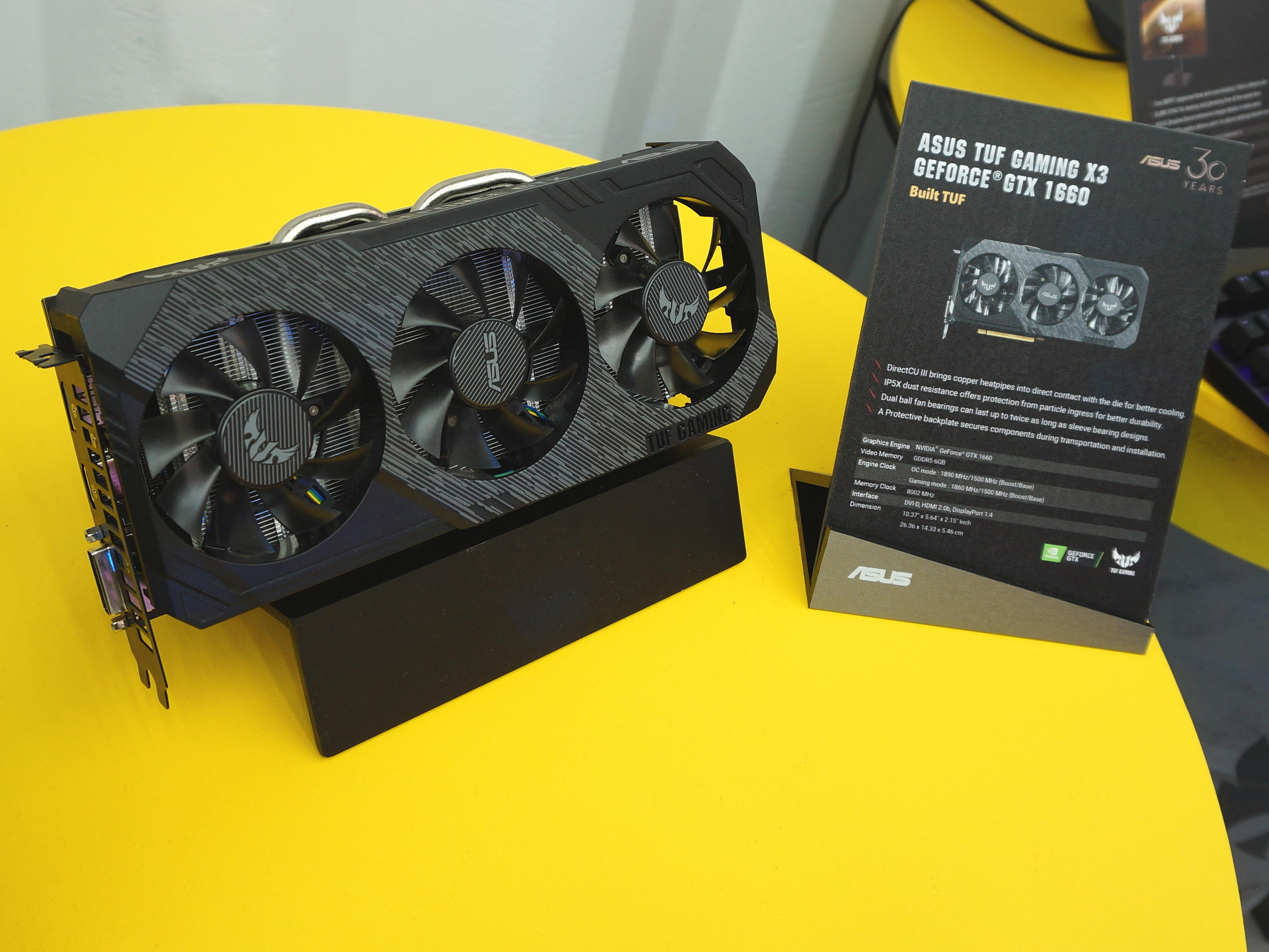 中文（台灣）: 2019台北國際電腦展，華碩電腦NVIDIA GeForce GTX 1660顯示卡TUF Gaming X3。